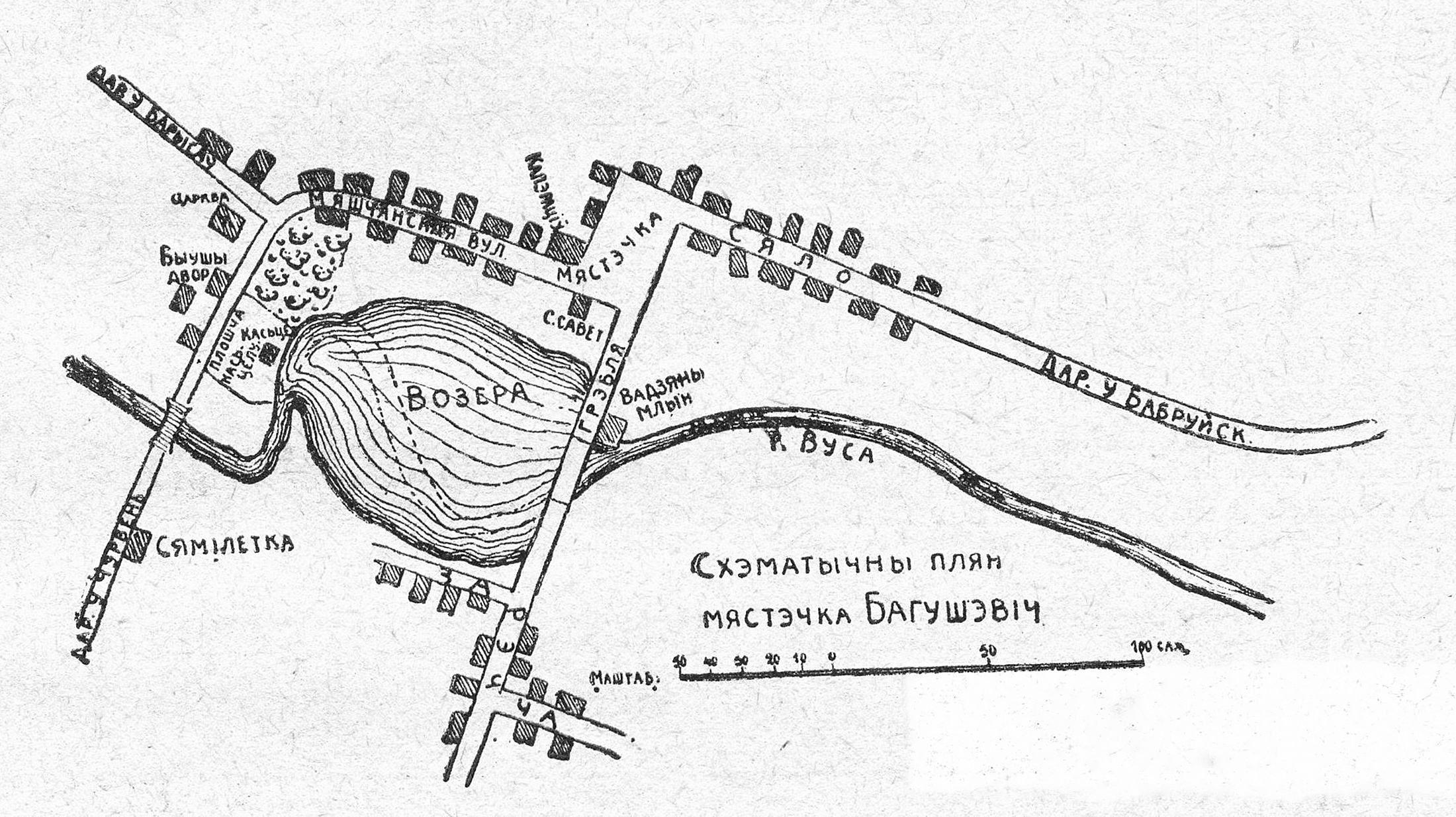 Беларуская (тарашкевіца): Багушэвічы (Bahuševičy). Плян мястэчка